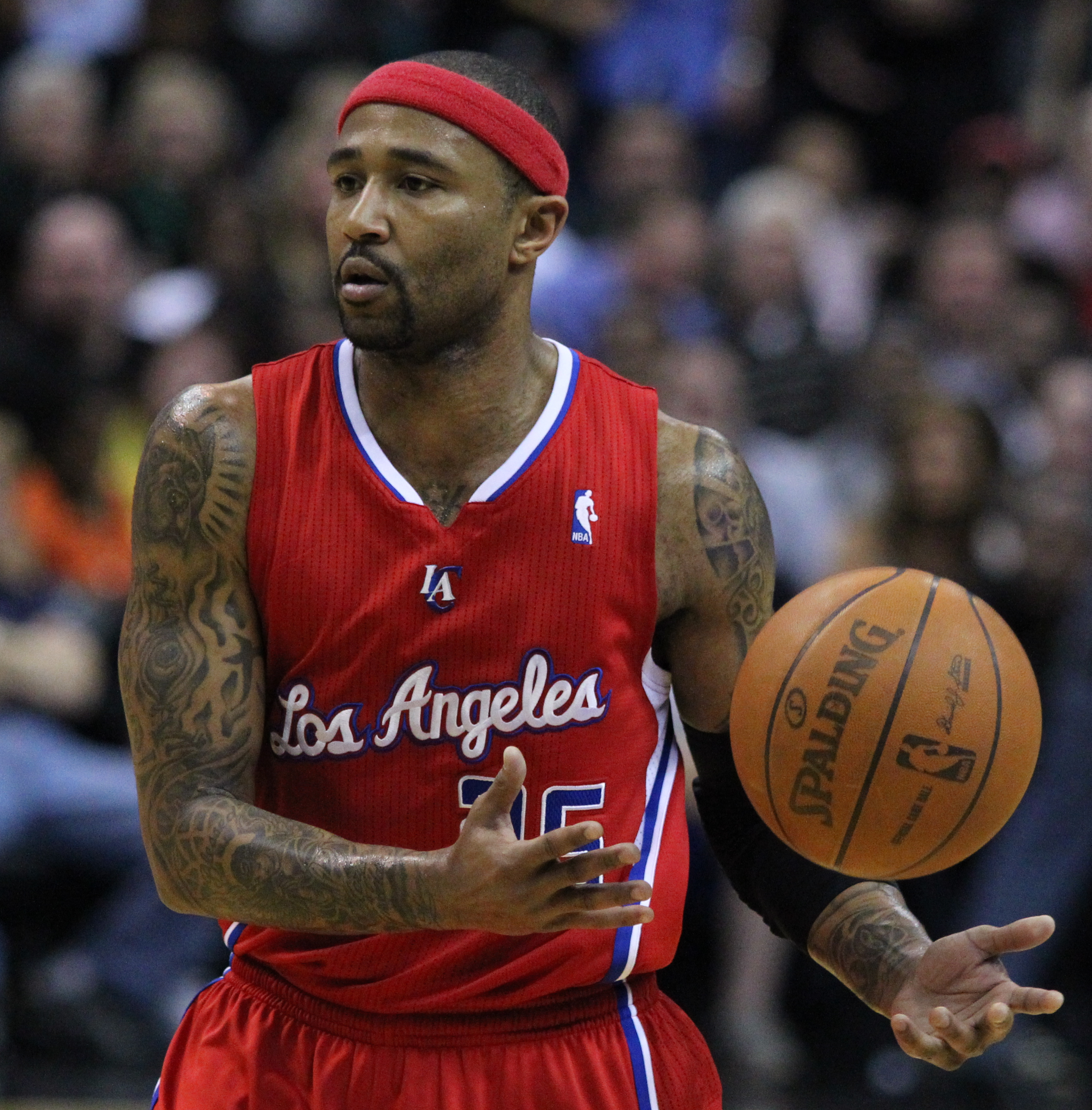 Wizards v/s Clippers 03/12/11